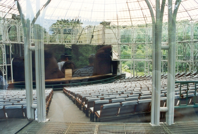 Curitiba - Ópera de Arame - Auditório